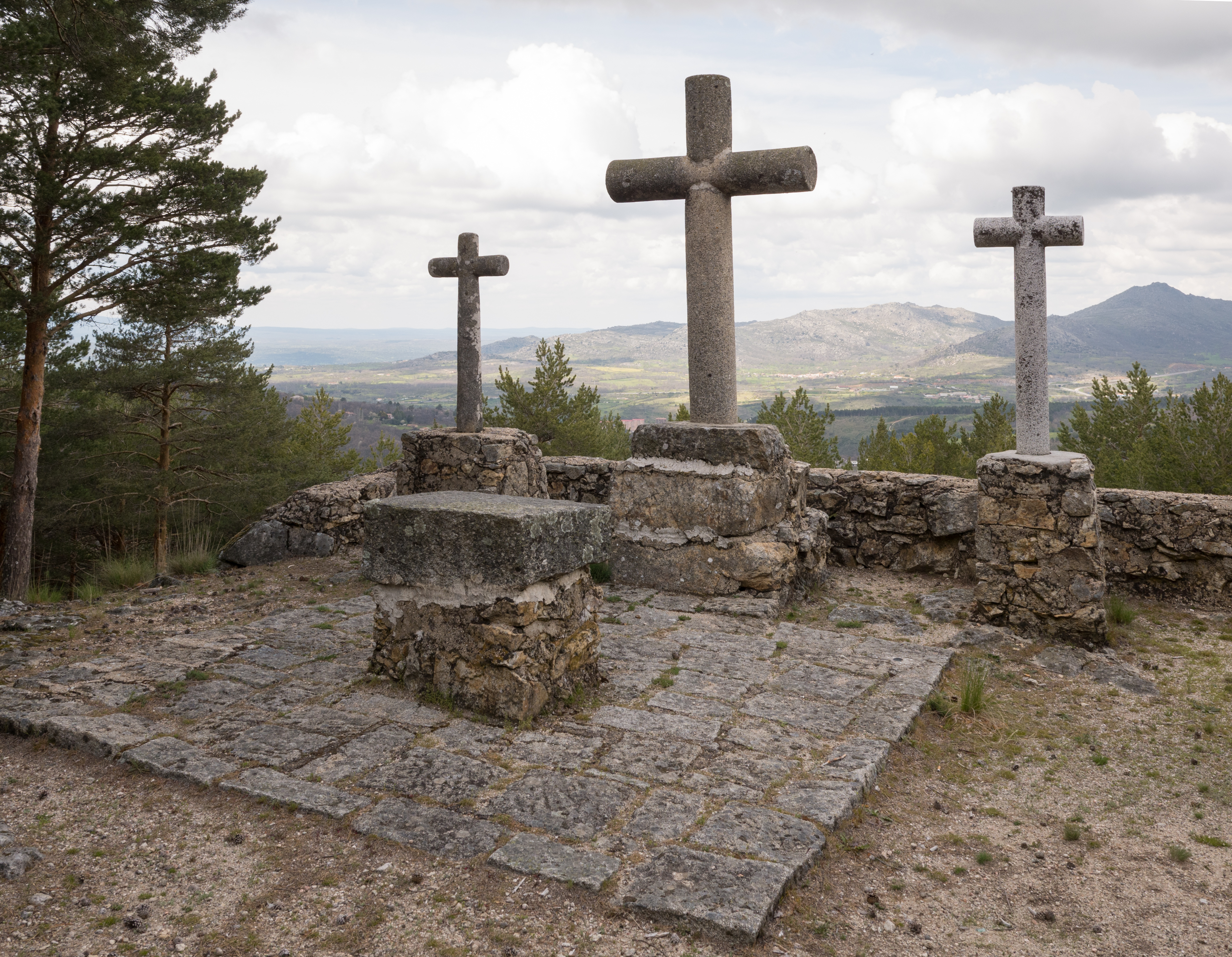 Cruz del Herrito, Candelario. Salamanca, Castilla-León, España